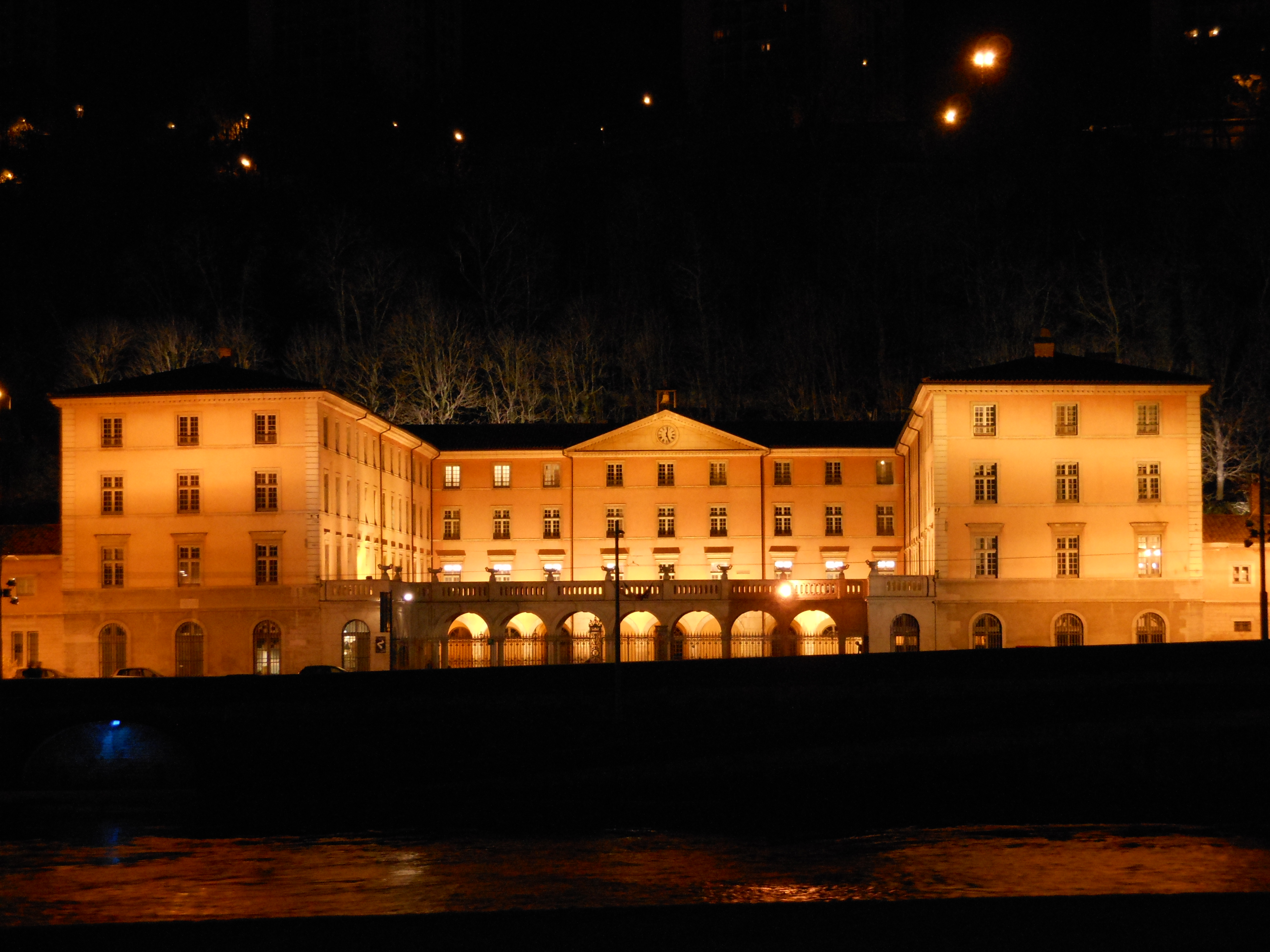 Le CNSMD de Lyon de nuit